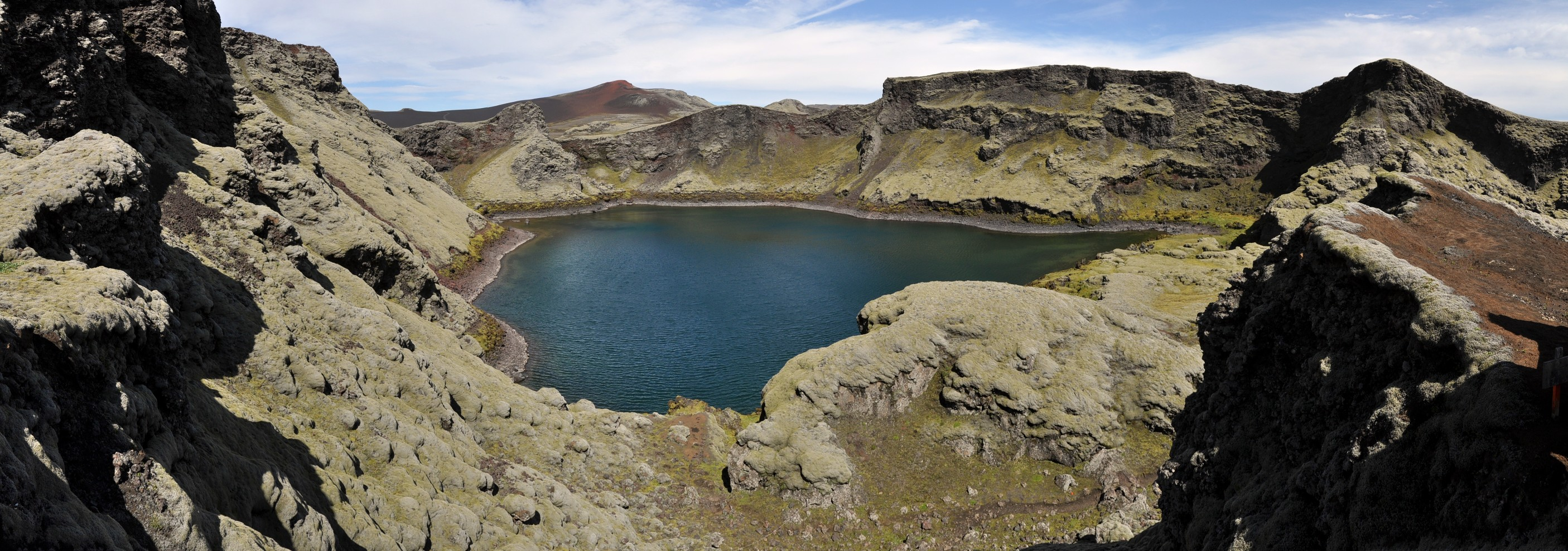 Crater inundado en Lakagigar (Islandia)